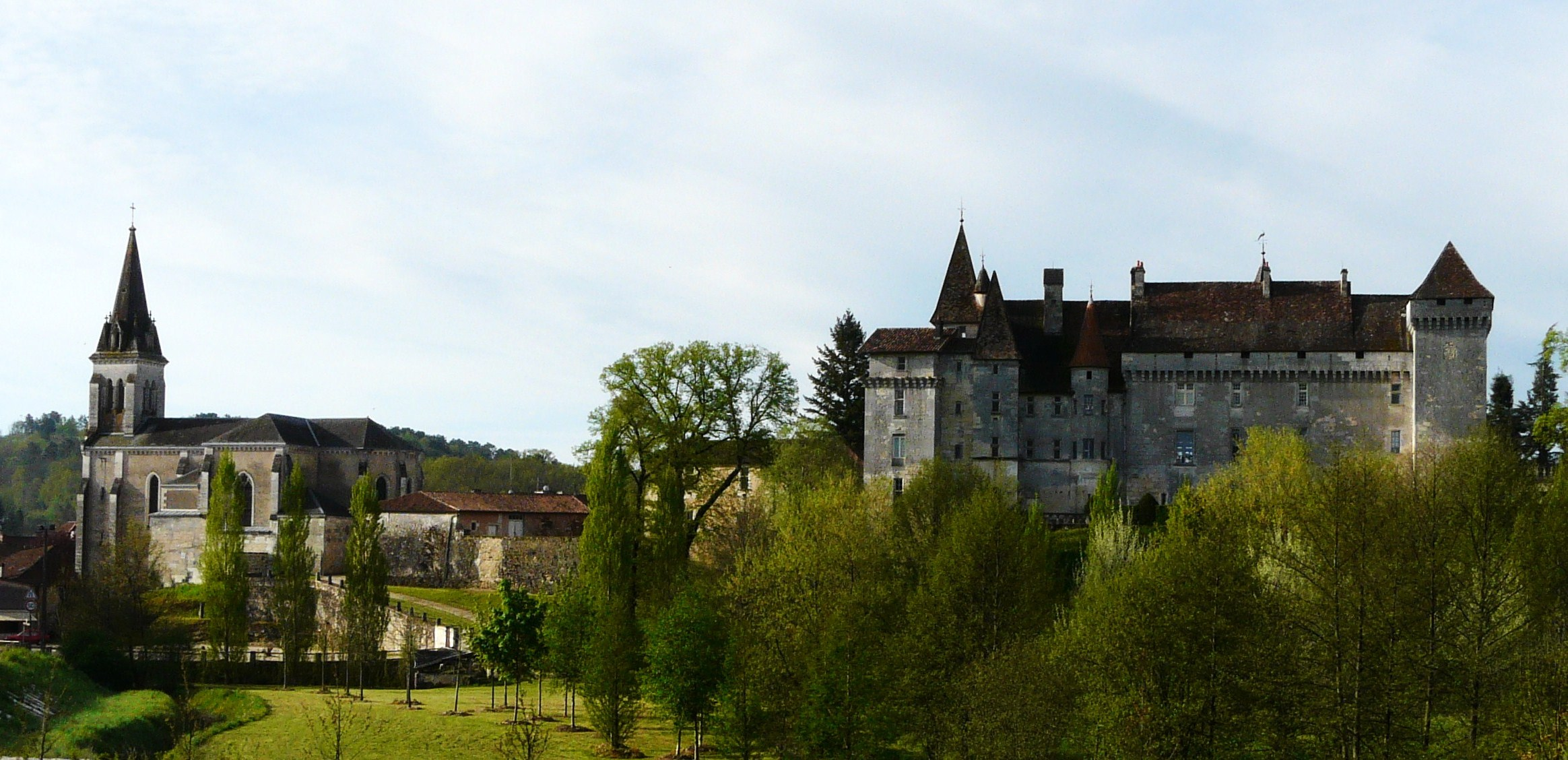 L'église Saint Julien et le château de Château-l'Évêque vus du nord, Dordogne, France Object location45° 14′ 46″ N, 0° 41′ 04″ E